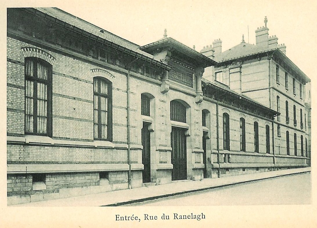 Deventure du lycée Molière (Paris)